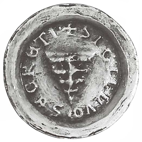 Sekretsigel vum Heinrich V. vu Lëtzebuerg